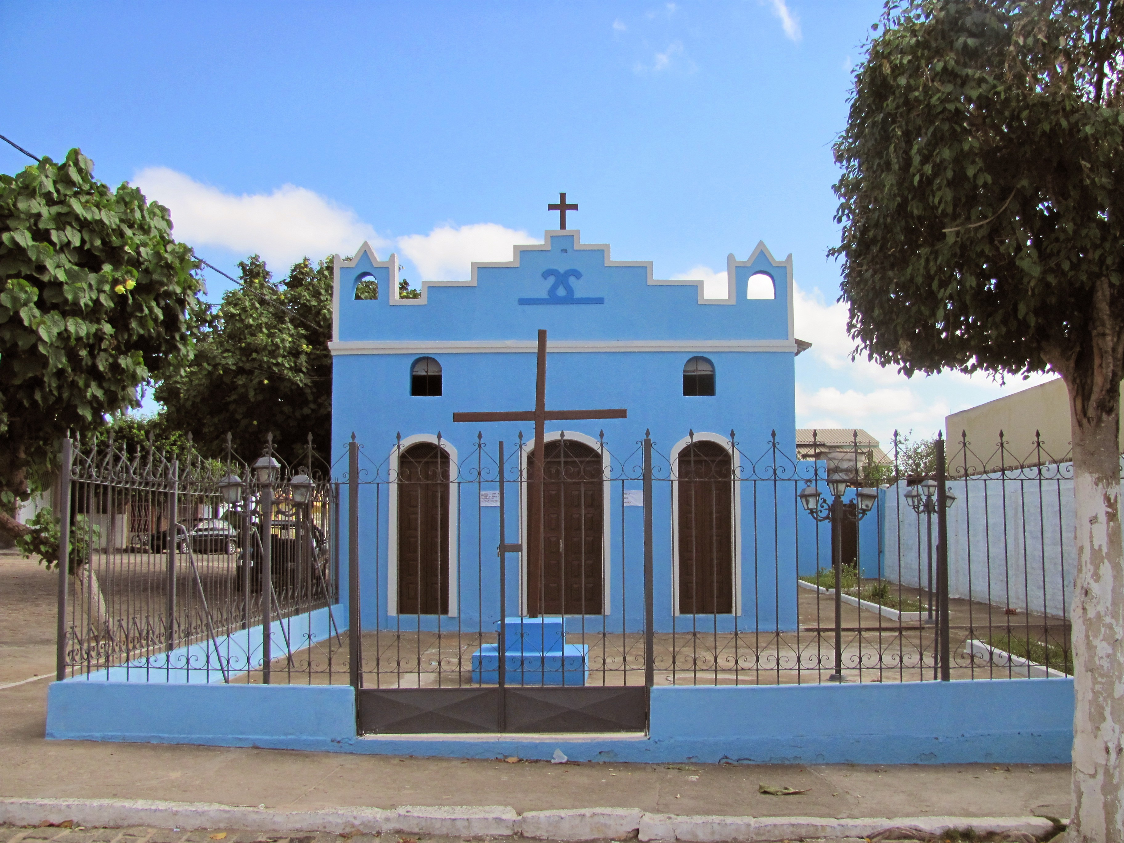 Igreja Centenária de Araci Bahia / Primeira Igreja de Araci